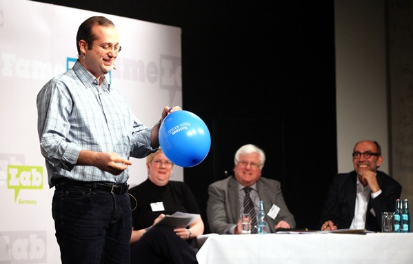 Erfan Kasraie, Student der Universität Kassel, im Regional-Entscheid des FameLab Hessen am 14. März 2014. Der FameLab ist ein internationaler Wettbewerb für Wissenschaftskommunikation, der in Zusammenarbeit mit dem Magazin GEO, der Helmholtz-Gemeinschaft und dem British Council ausgerichtet wird